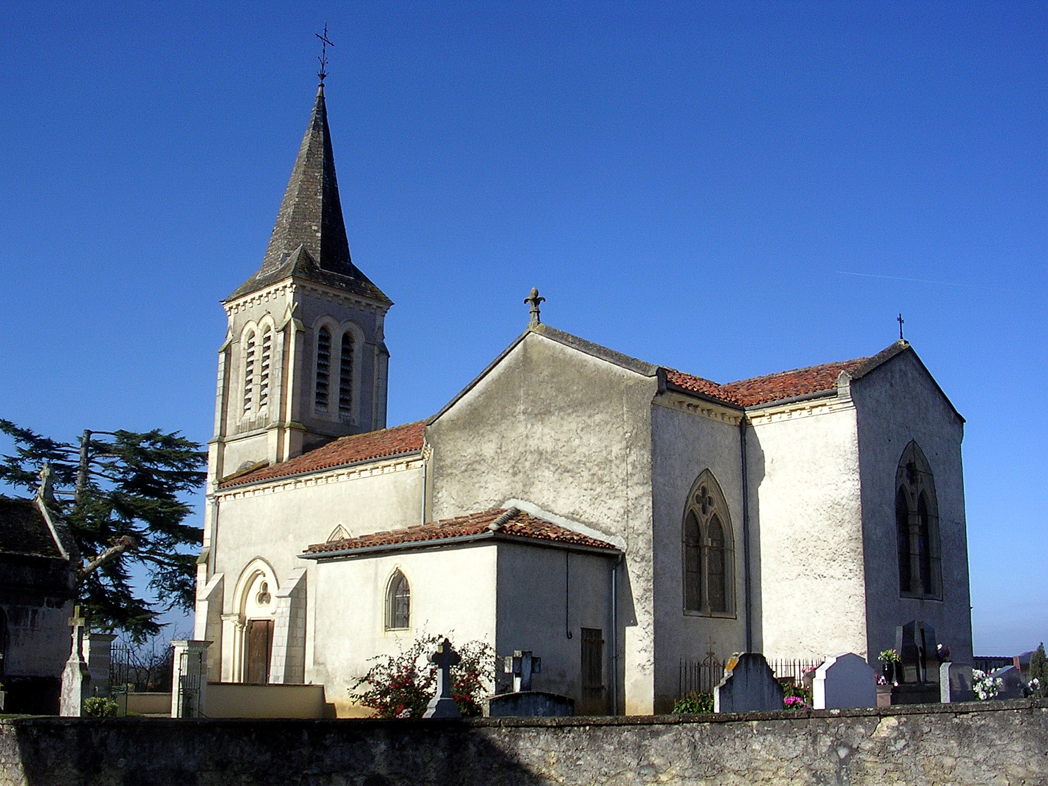 Église Saint-Pierre de Dumes (Landes, France)